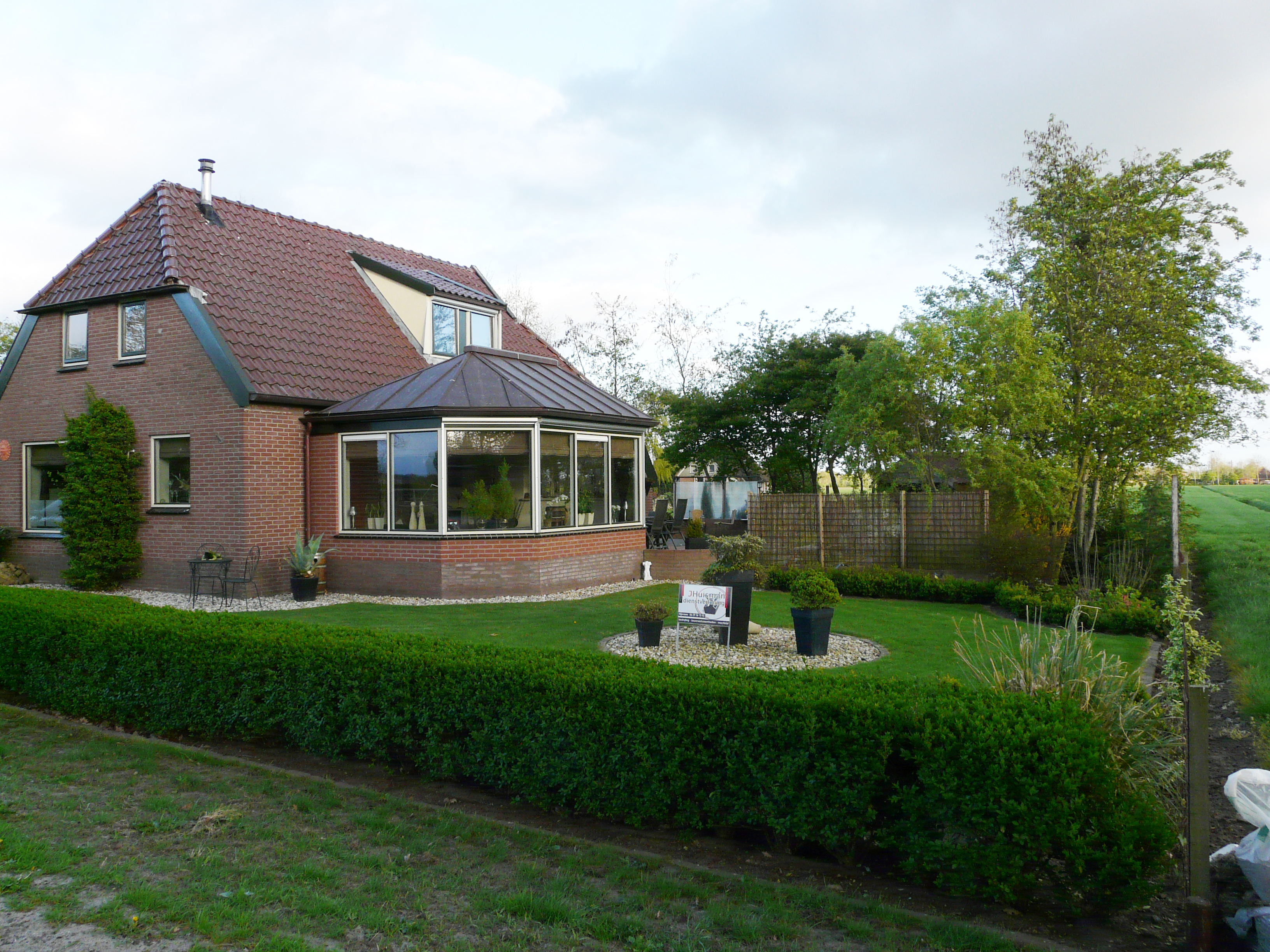 Kolderveense Bovenboer in Nijeveen